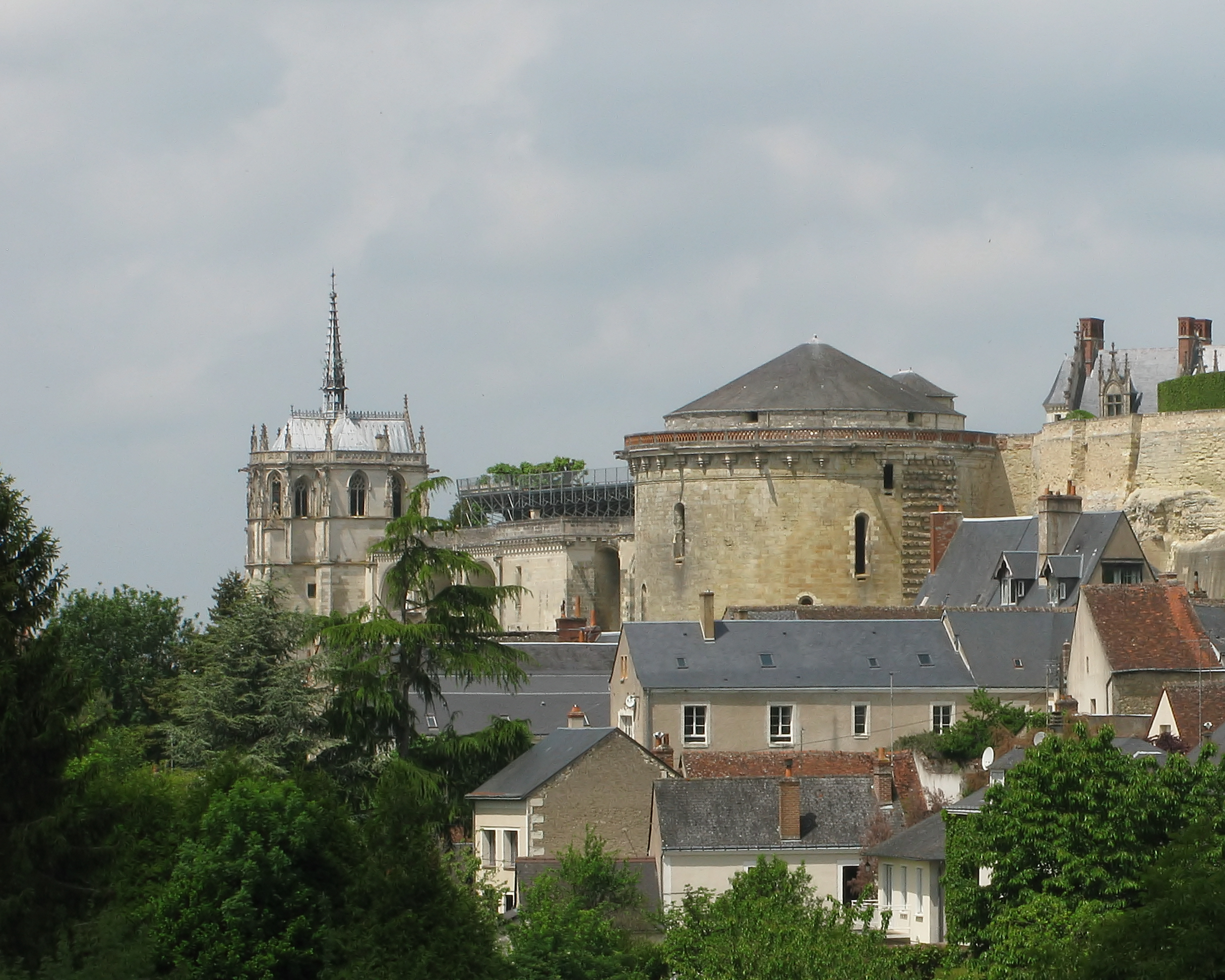 Chapelle Saint-Hubert du château d'Amboise vue depuis le château du Clos Lucé.